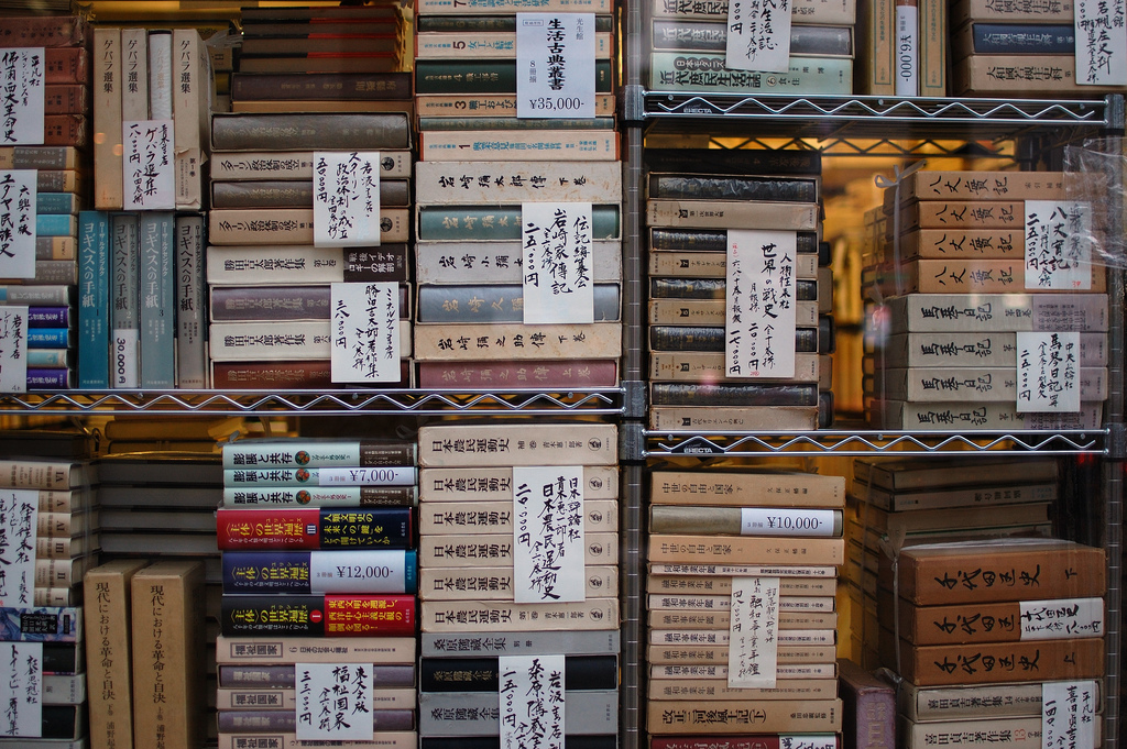 ある古書店の古本。東京都千代田区神田神保町2丁目にて。地図はこちら。